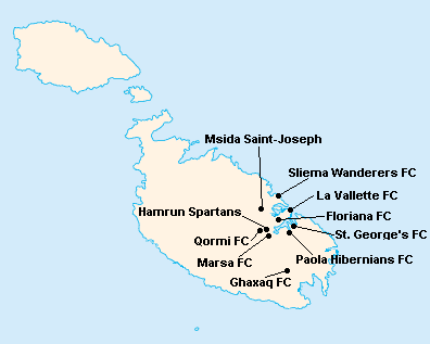 Répartition des clubs en First Division Maltaise 1978-1979.